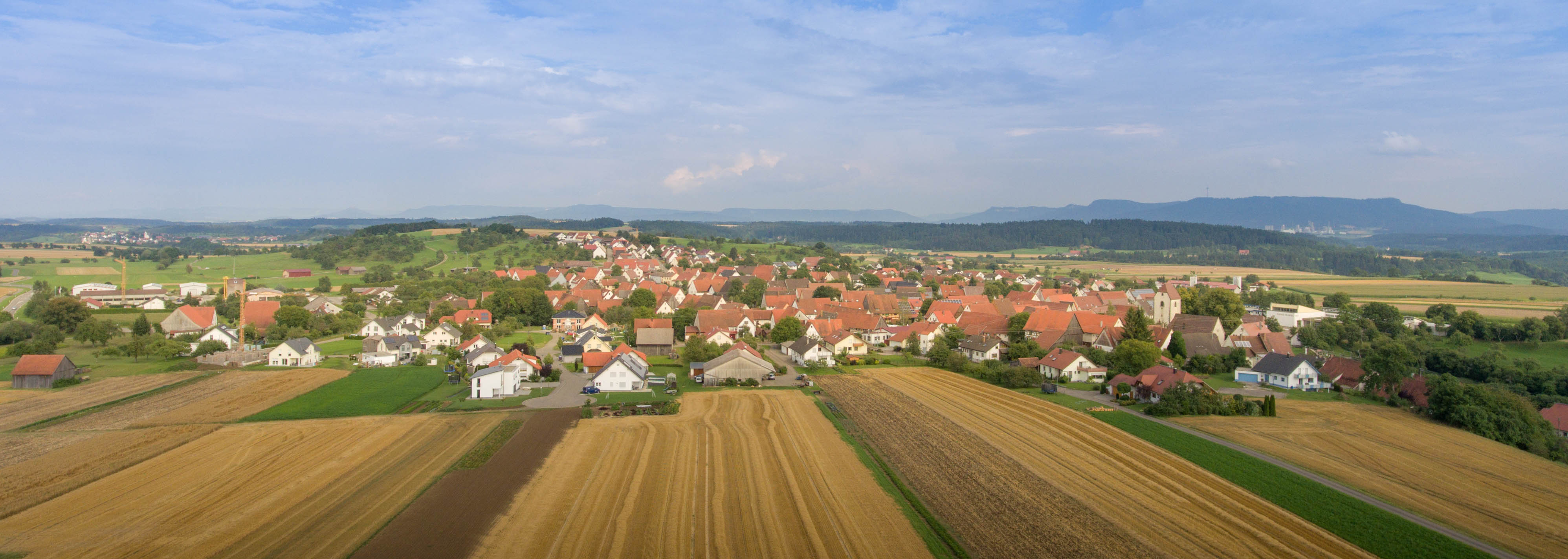 Eine Luftaufnahme von Leidringen aus westlicher Richtung.